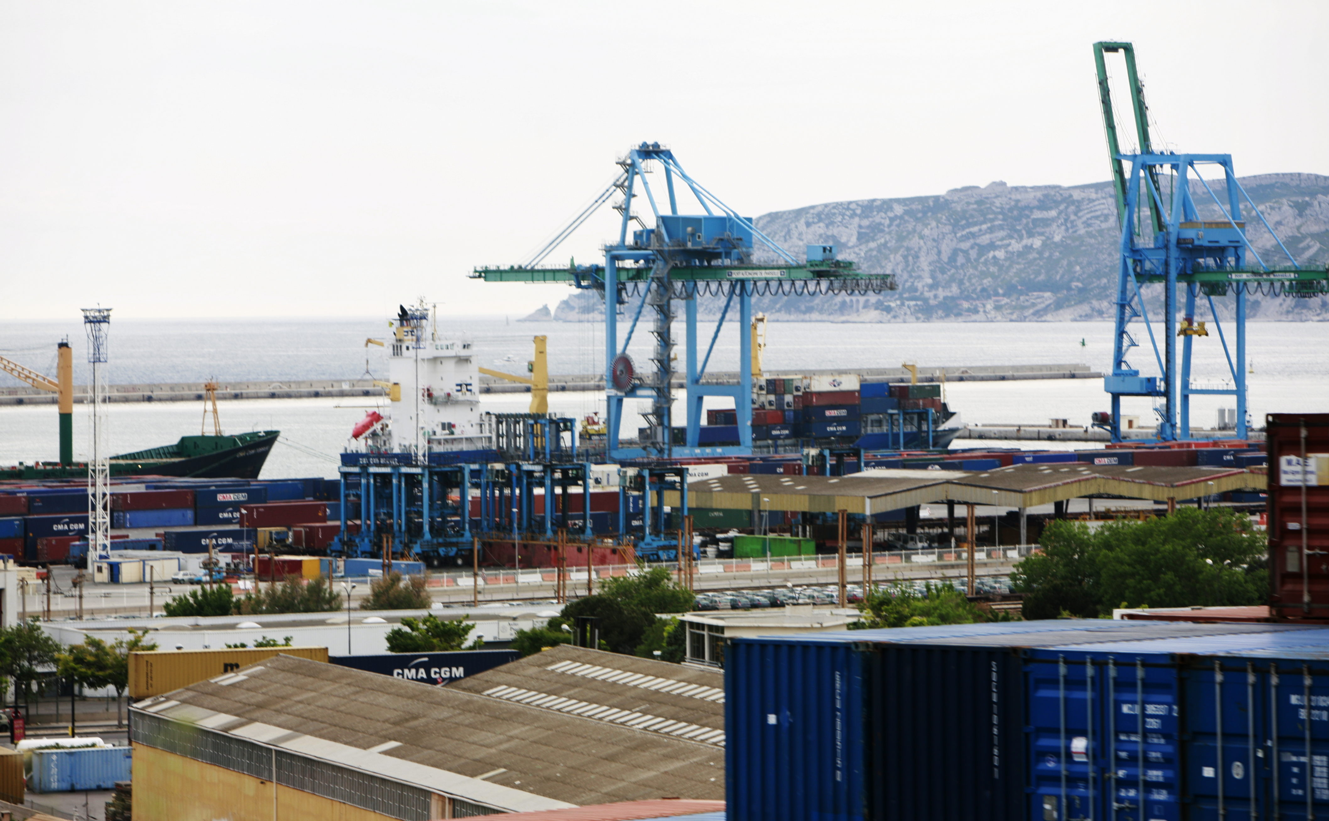 Marseille harbour